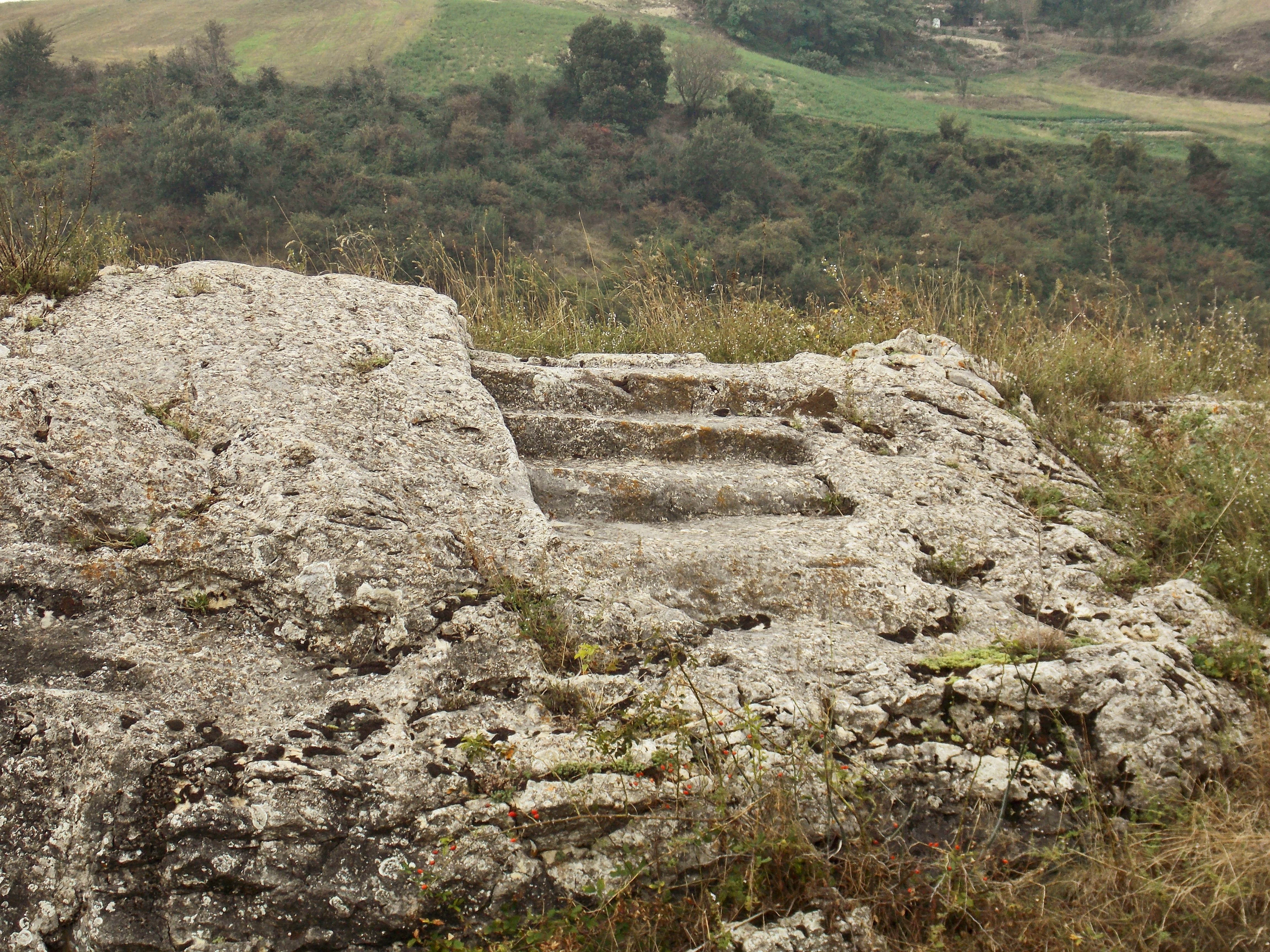 La roccia del Castello di Pietramaggiore nel territorio di San Giorgio La Molara (BN)